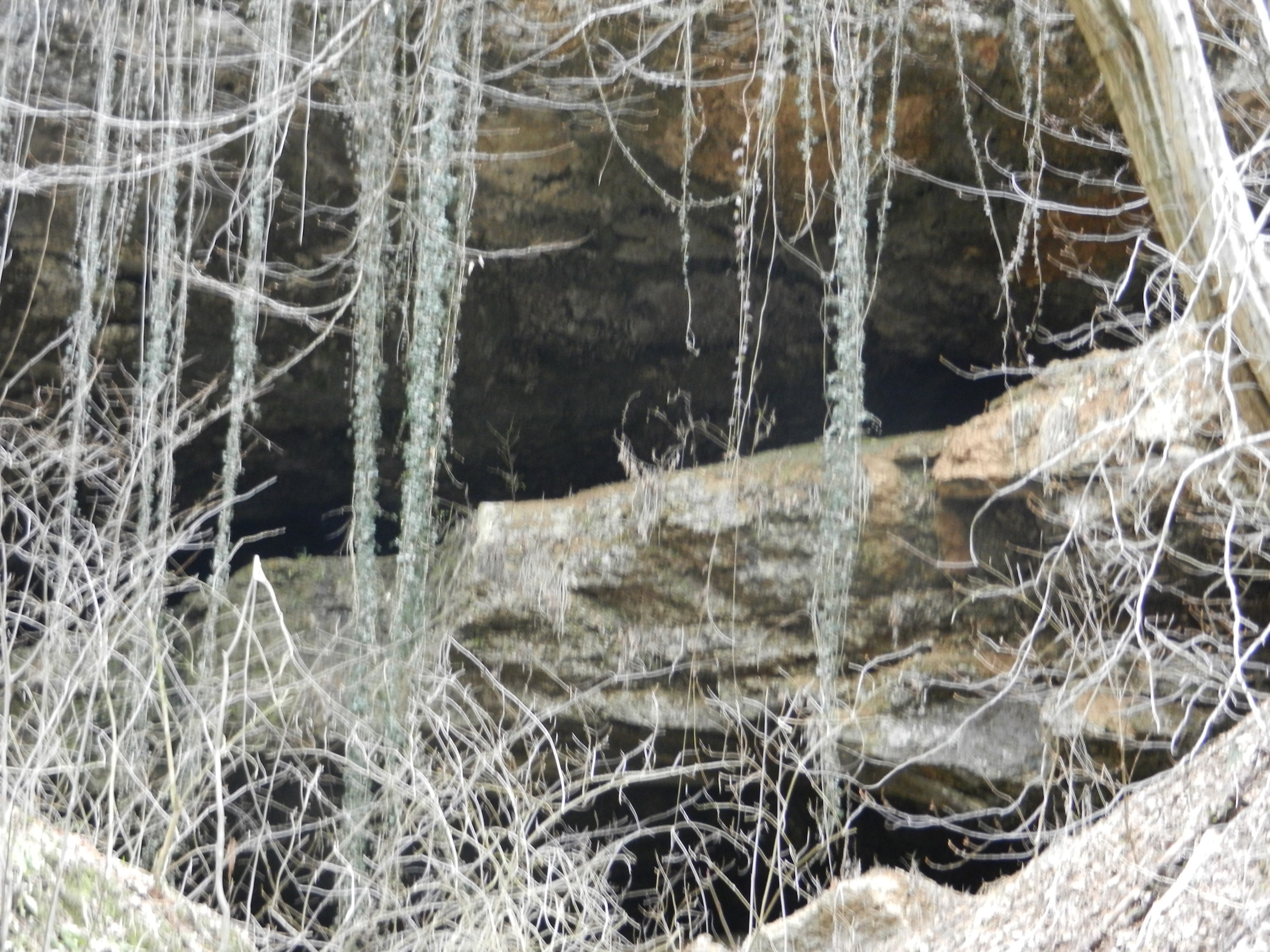 Arneževa luknja - jama v konglomeratu v Udinem borštu na Gorenjskem.